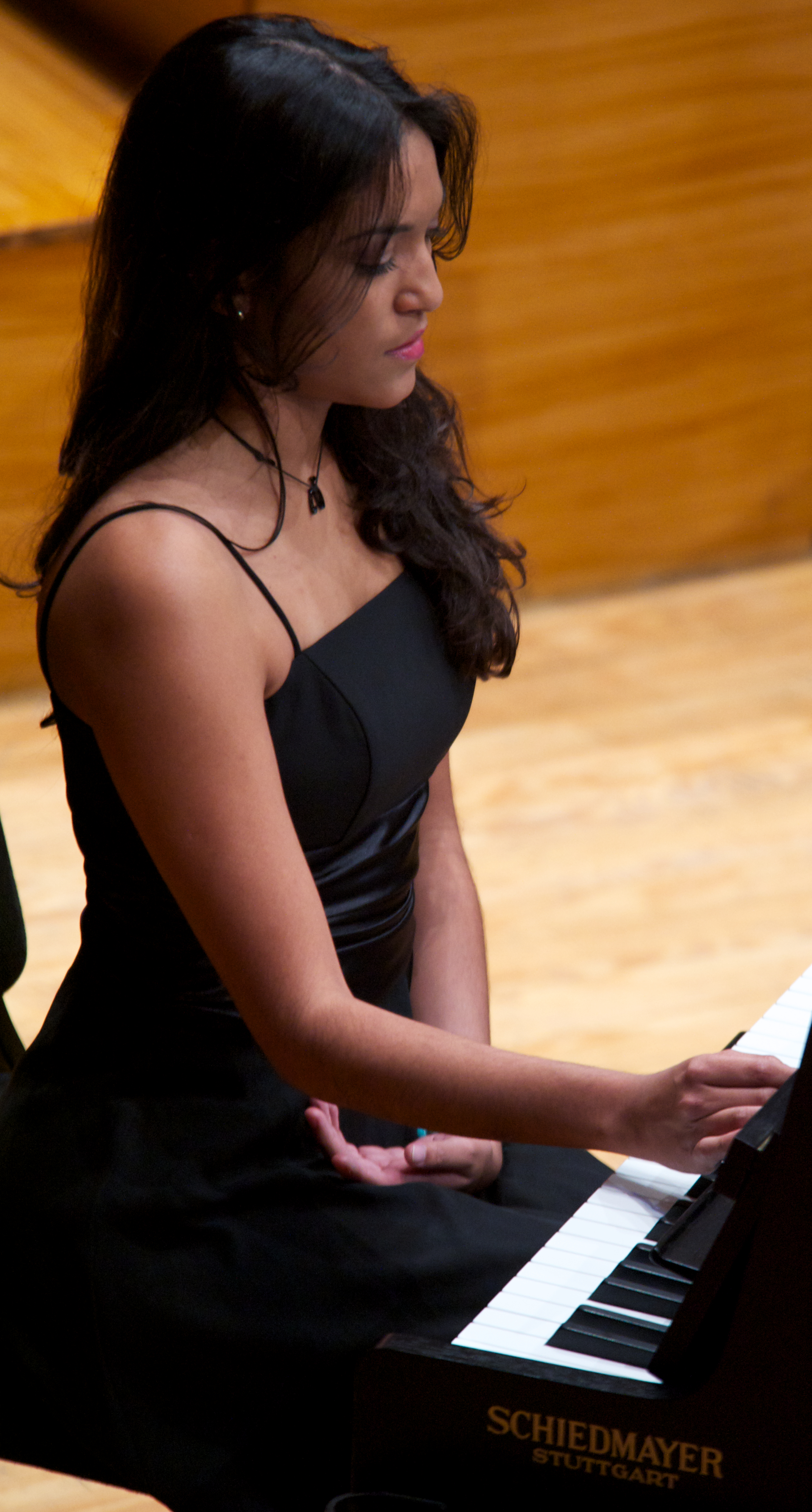 Tocando.